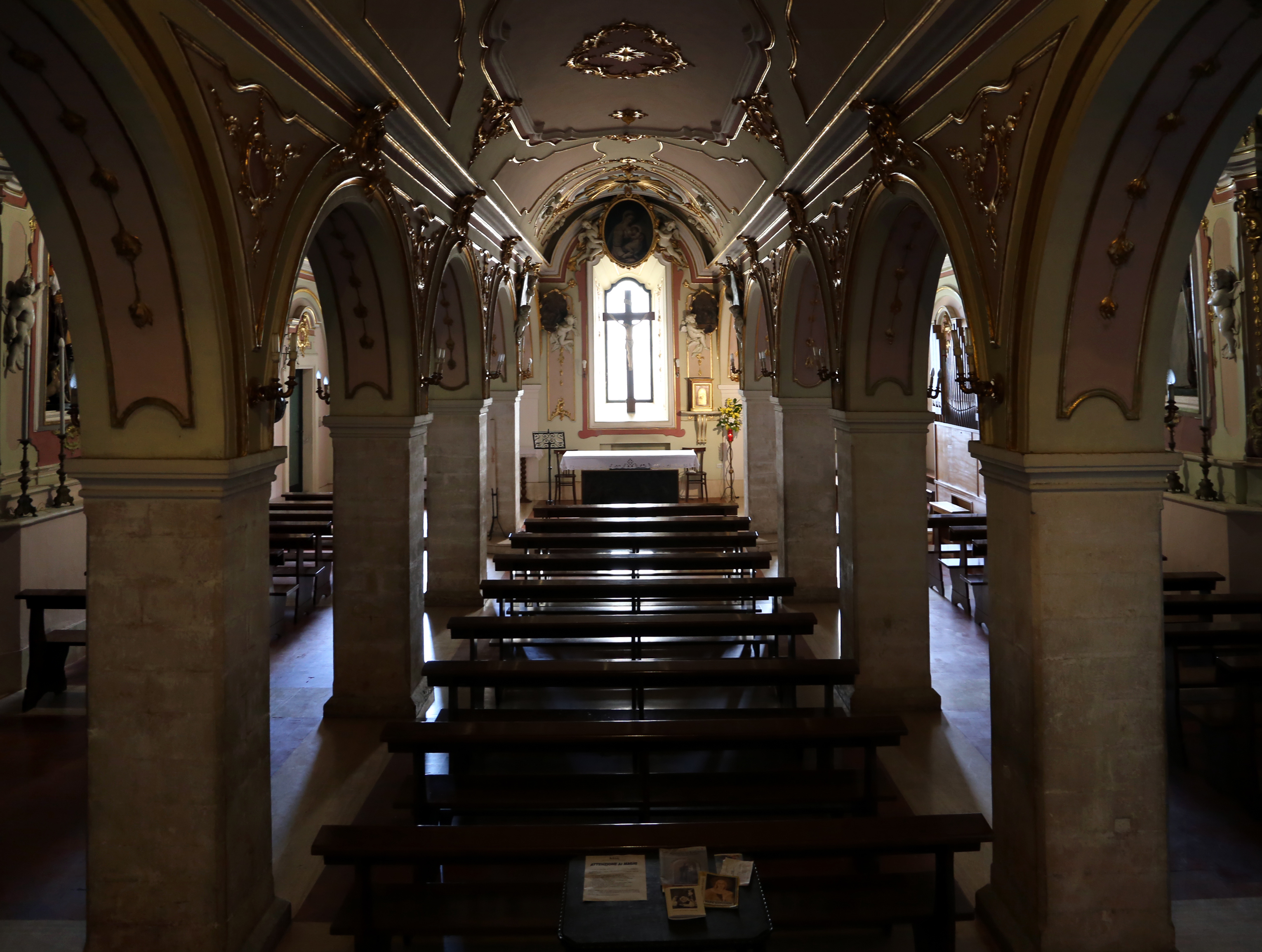 Piazza Santa Maria Maggiore This is a photo of a monument which is part of cultural heritage of Italy.